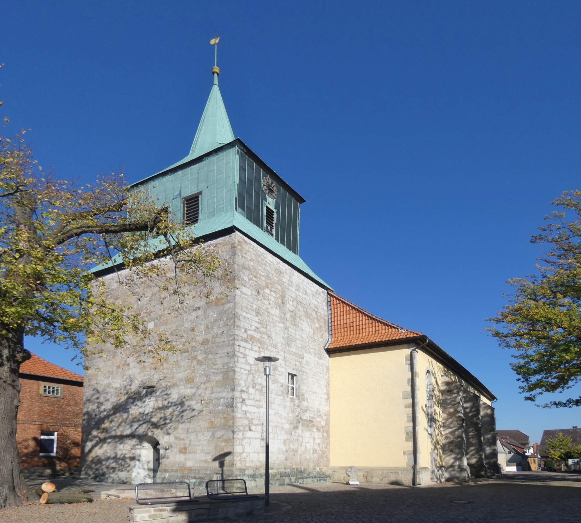 Südwestansicht der St.-Alexandri-Kirche in Eldagsen. In der Nische zwischen Turm und Schiff steht seit 2014 der Alexanderstein